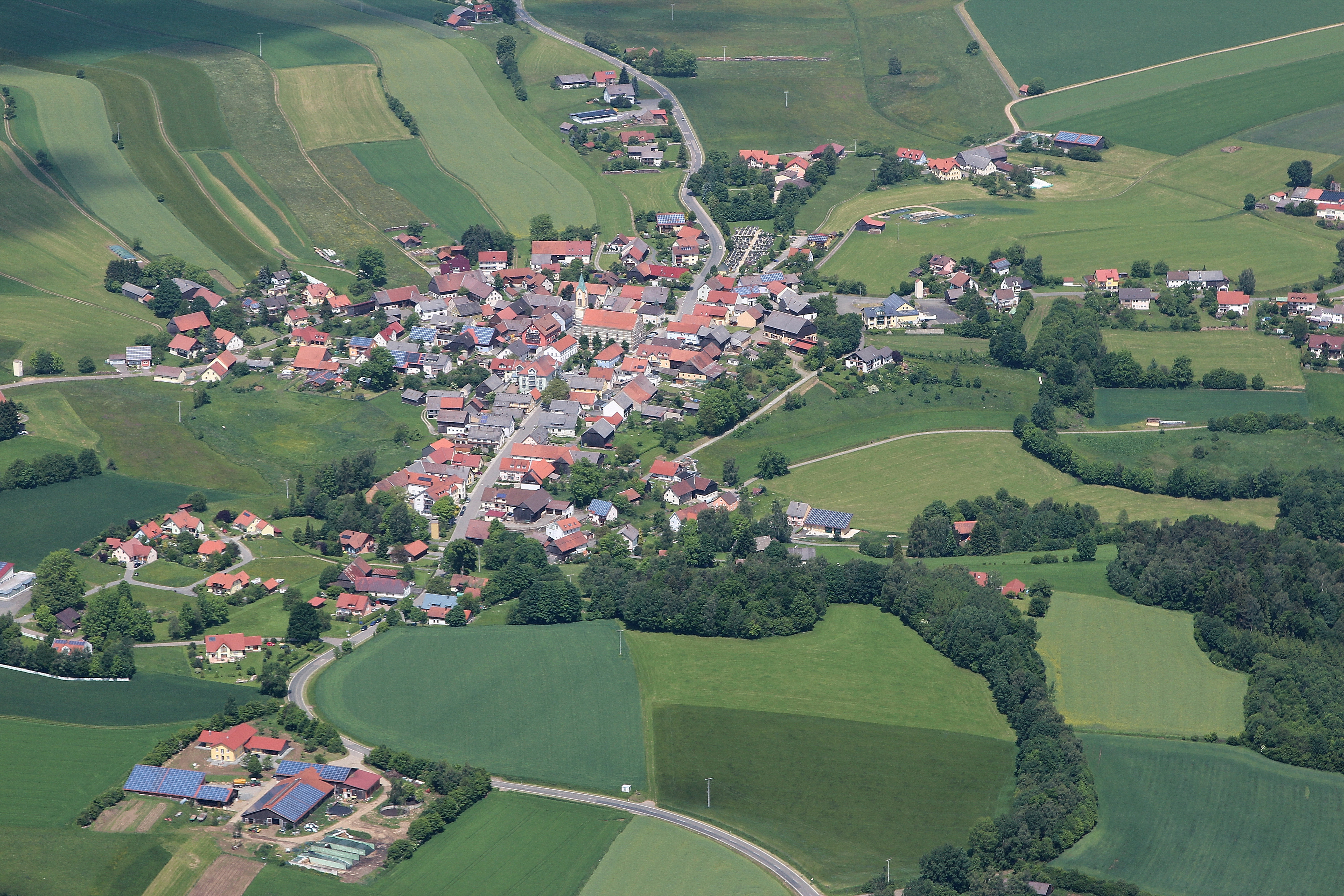 Weiding,Landkreis Schwandorf, Oberpfalz, Bayern